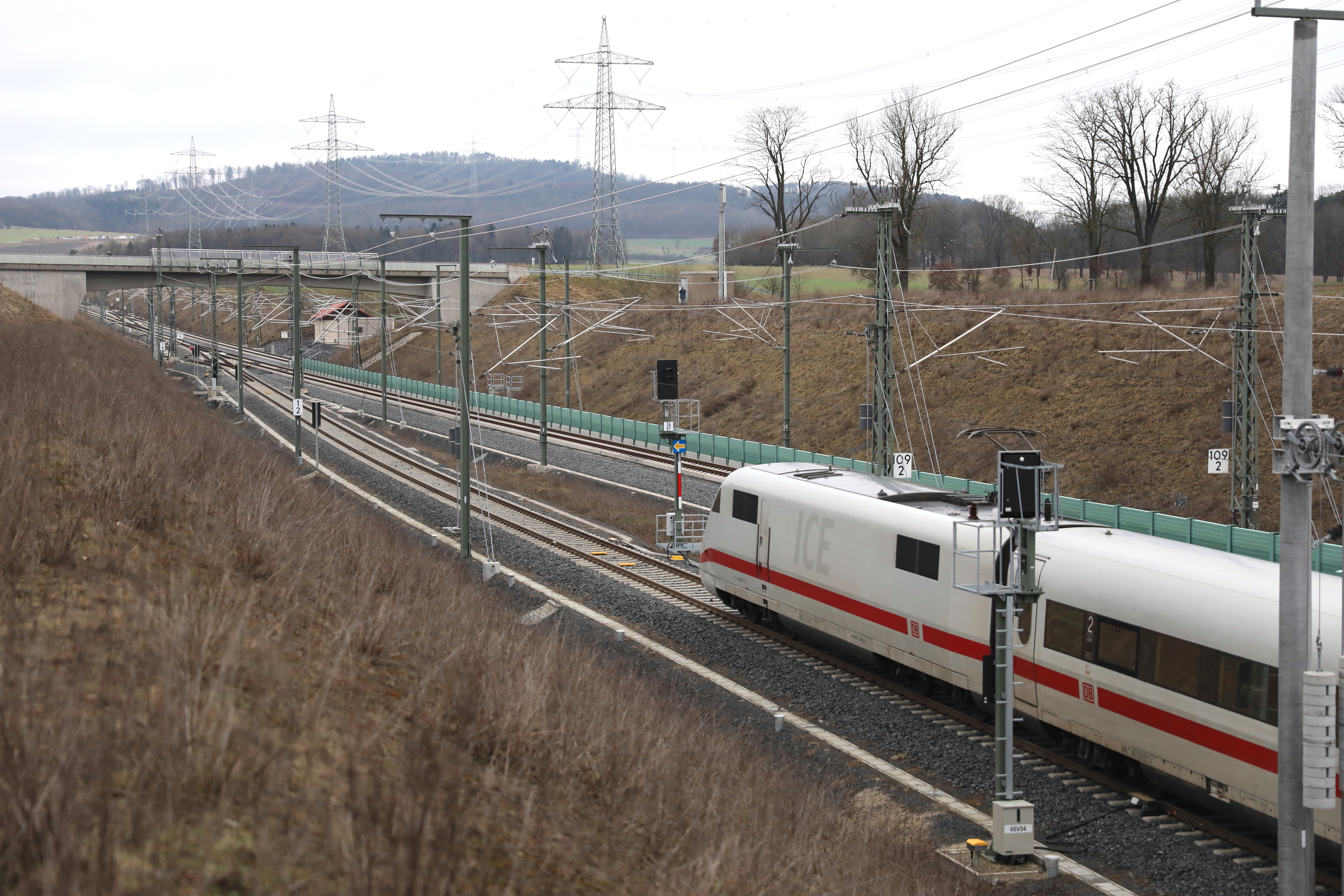 Nordseite Verbindungskurve Dörfles-Esbach, ICE 706, Zufahrtsicherungssignal dunkelgeschaltet